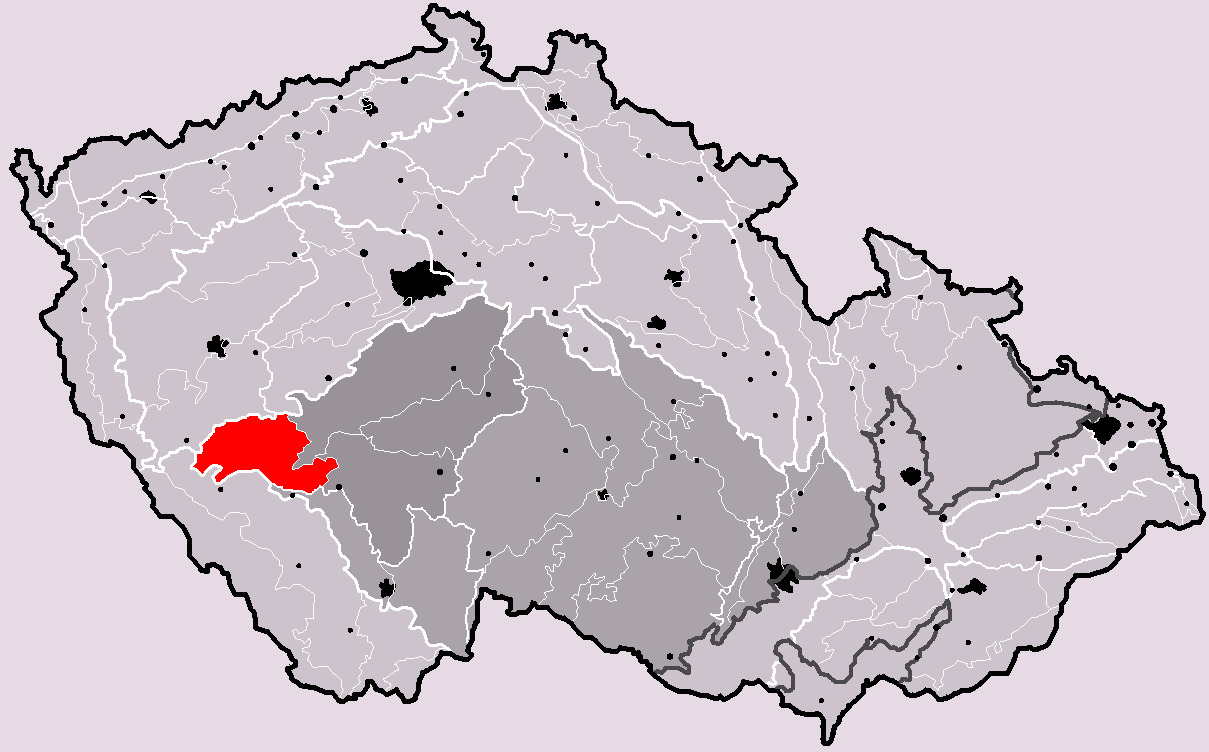 Poloha geomorfologického celku Blatenská pahorkatina v rámci České republiky. Hercynský systém Hercynská pohoří I Česká vysočina I2 (II) Česko-moravská subprovincie I2A (IIA) Středočeská pahorkatina I2A-4 (IIA-4) Blatenská pahorkatina